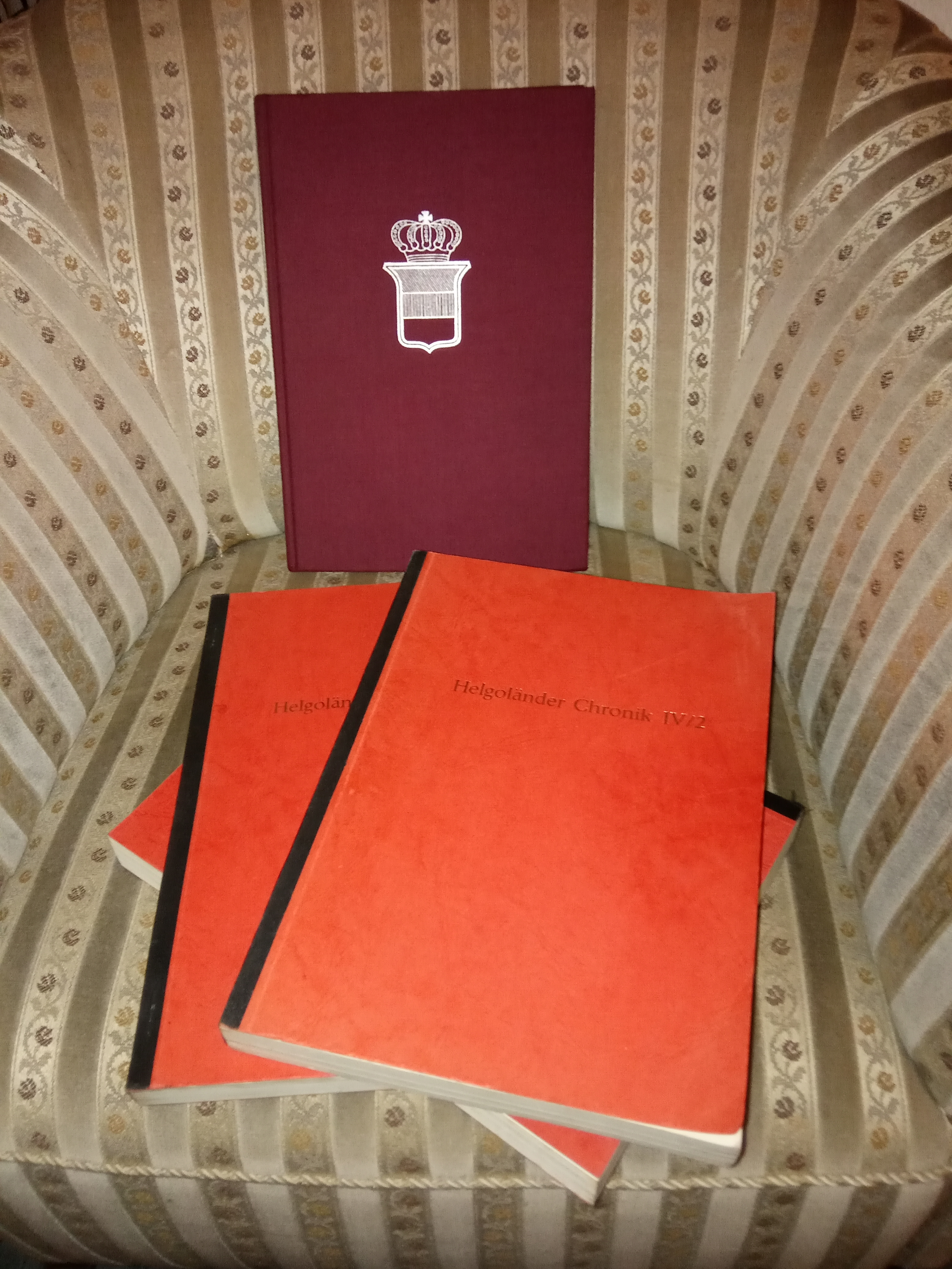 Helgoland Bücher, Weber-Chroniken in Varianten